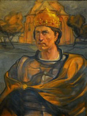 Зображення короля Андрія Юрійовича